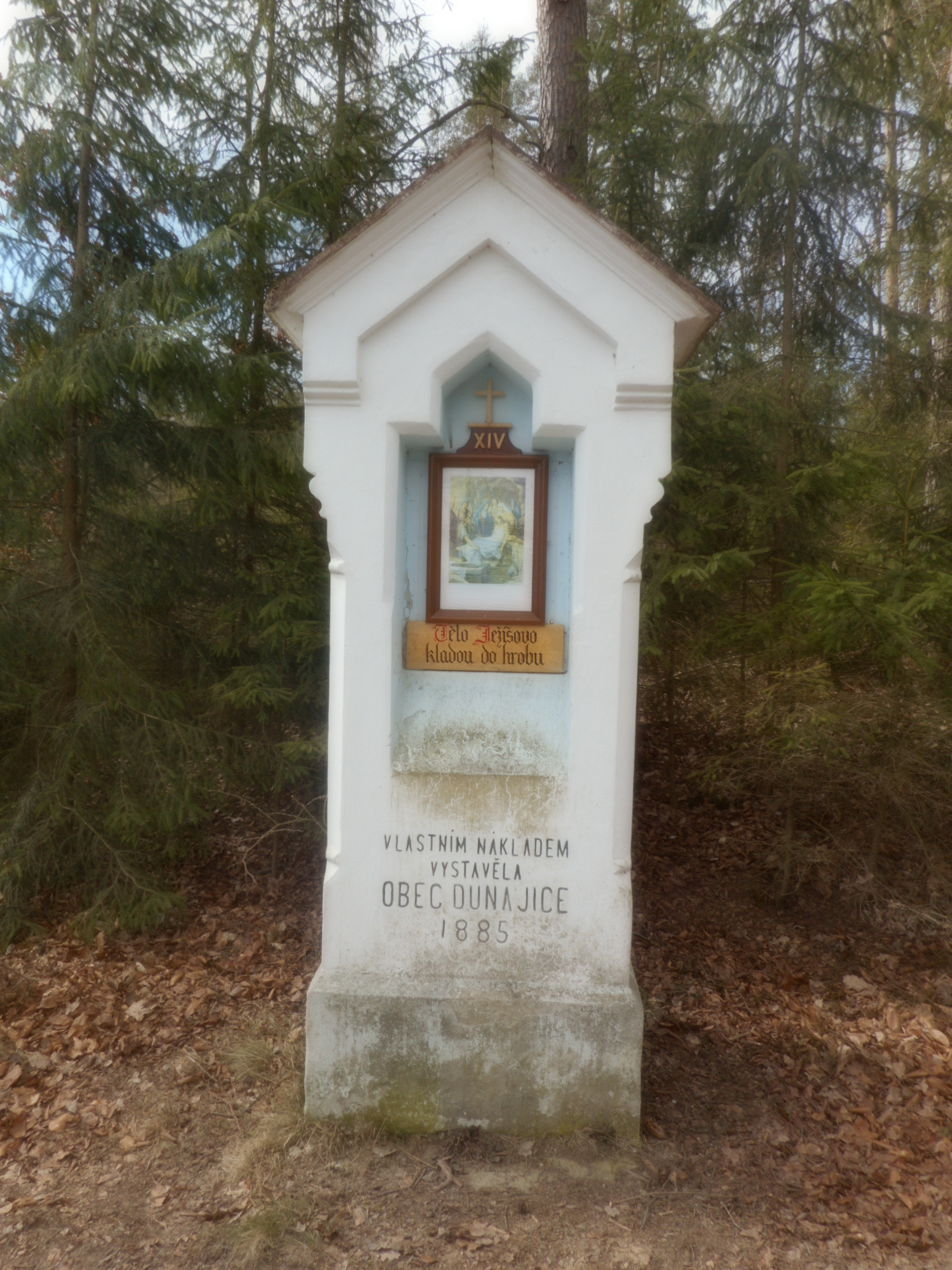 Křížová cesta Dunajovická hora